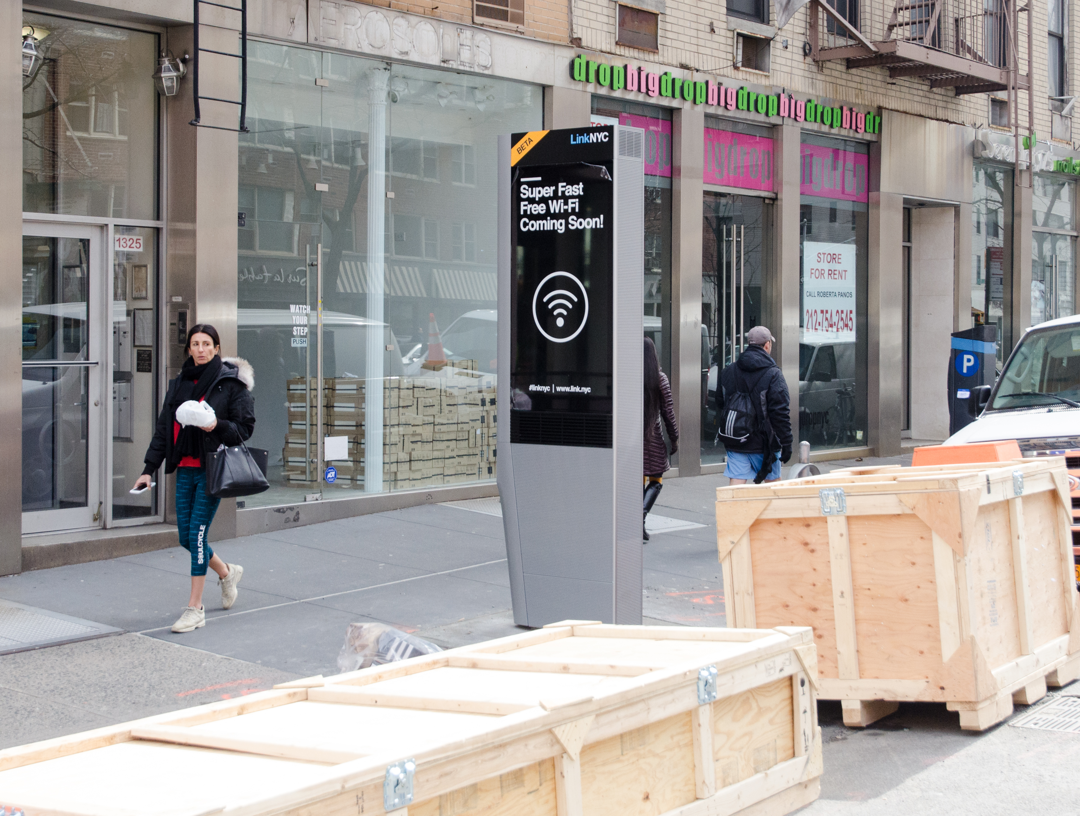 EHB_1777